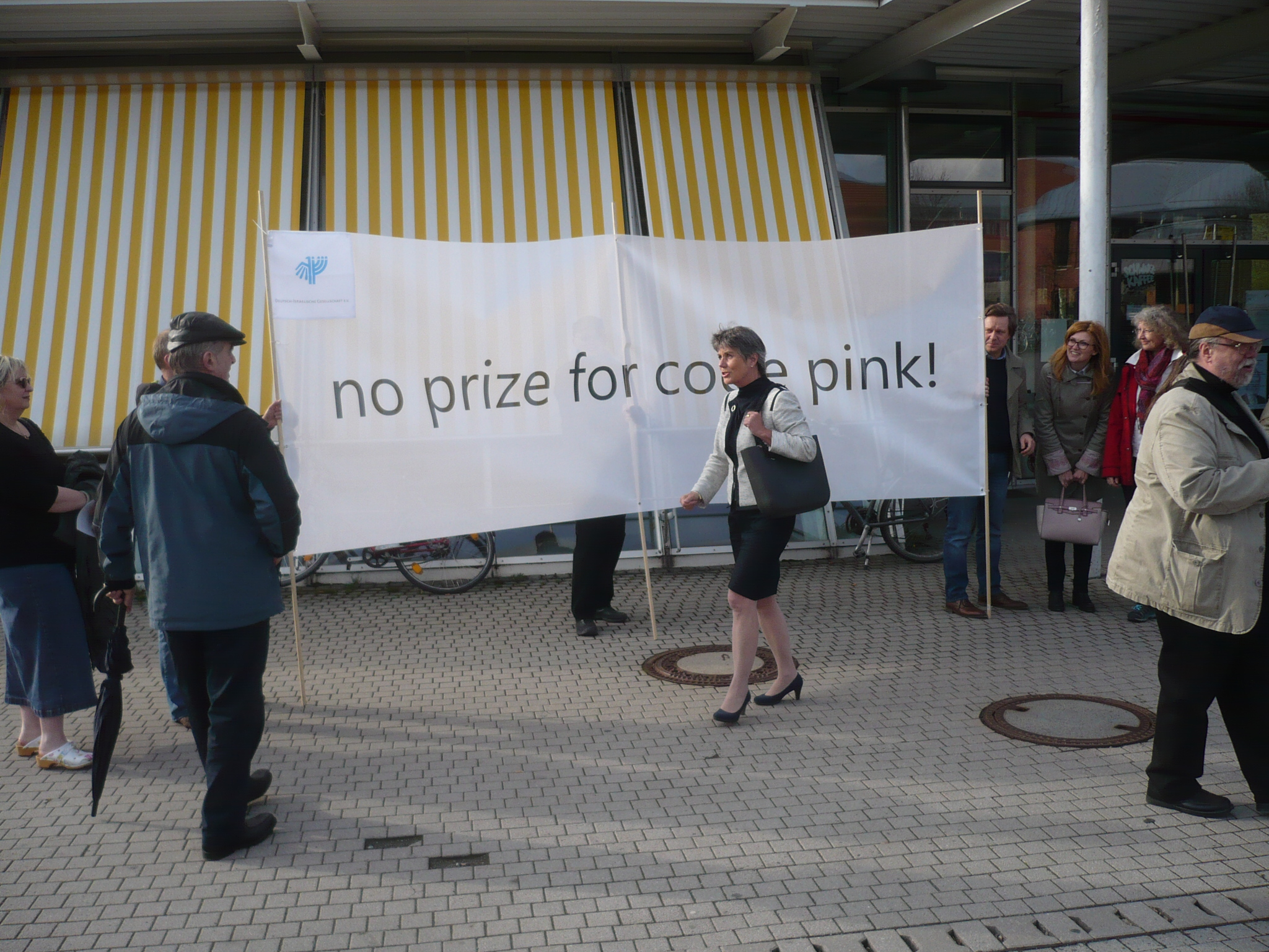 Demonstration anlässlich der Verleihung des „Wilhelmine-von-Bayreuth-Preises für Toleranz und Humanität in kultureller Vielfalt“ vor dem Audimax der Universität Bayreuth